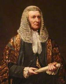 cropped